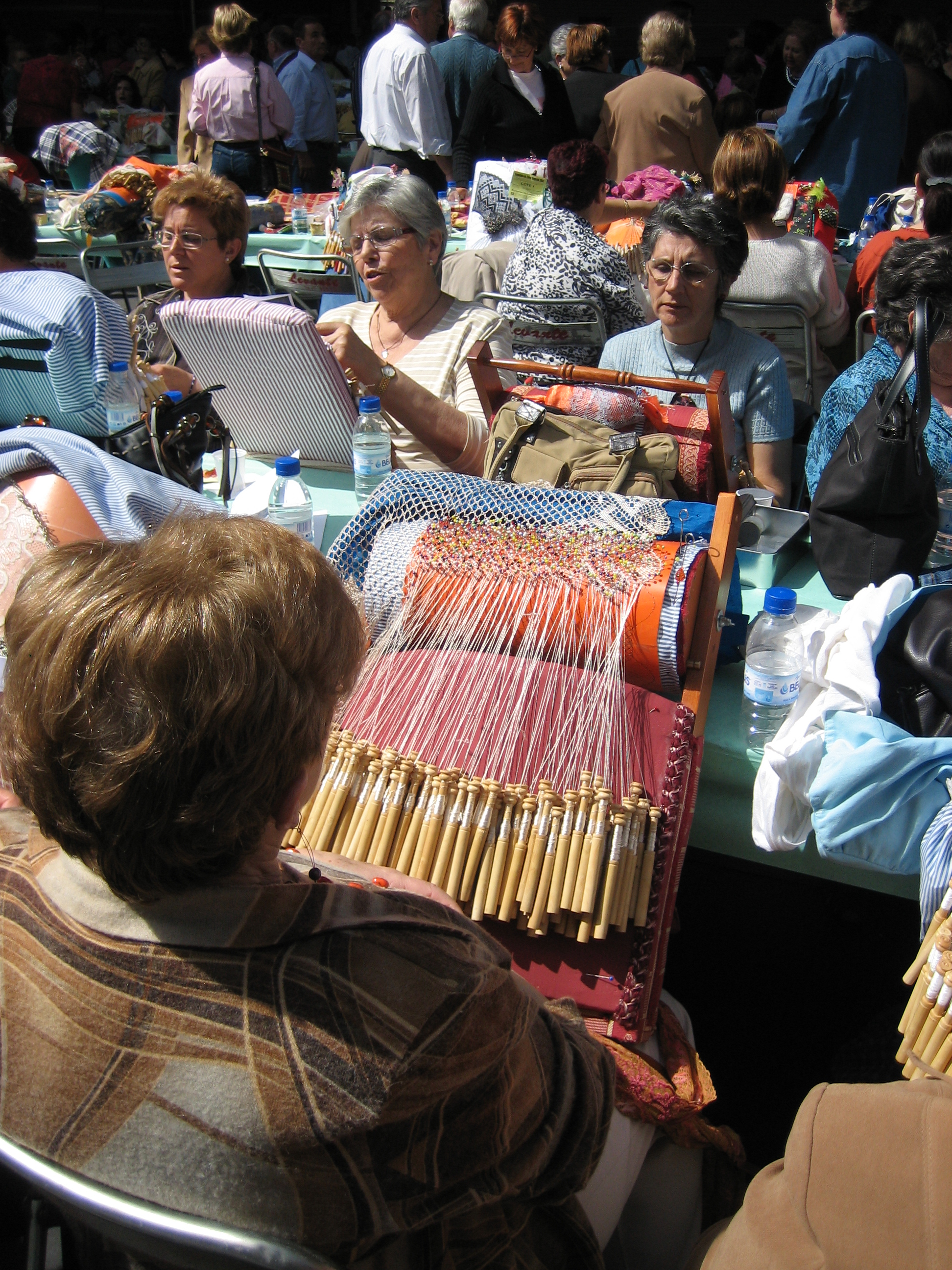 En Segorbe, Castellón.